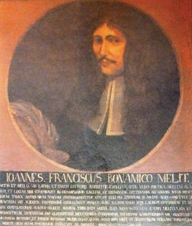 Giovan Francesco Buonamico (1639-1680)